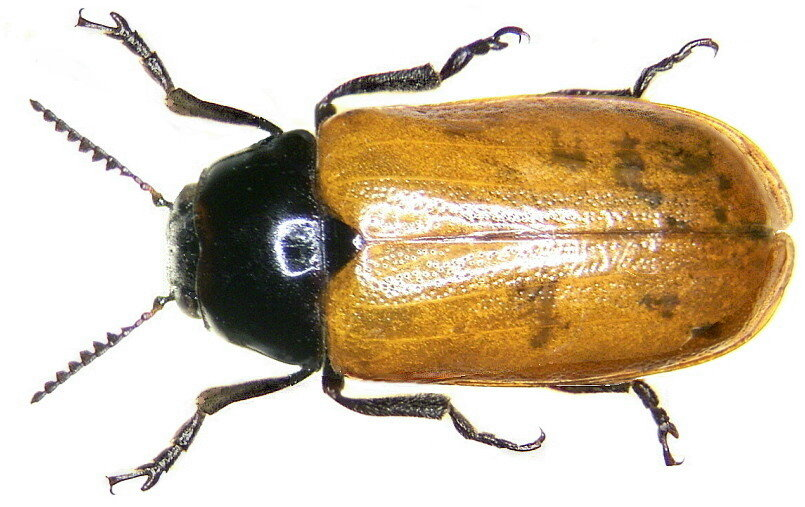 Familie: Chrysomelidae Grösse: 10 mm Fundort: Tunesien, Hammamet leg. U.Schmidt, 1993; det. Fritzlar Foto: U.Schmidt, 2006